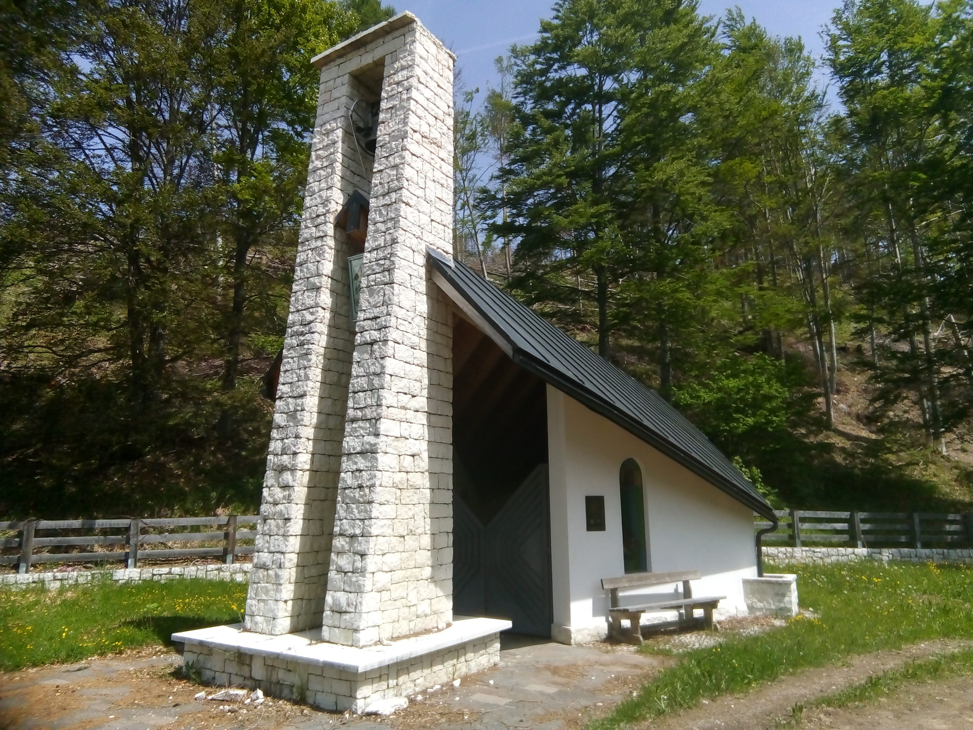 Vista completa della chiesetta alpina del Monte Lefre - comune di Castel Ivano (TN)